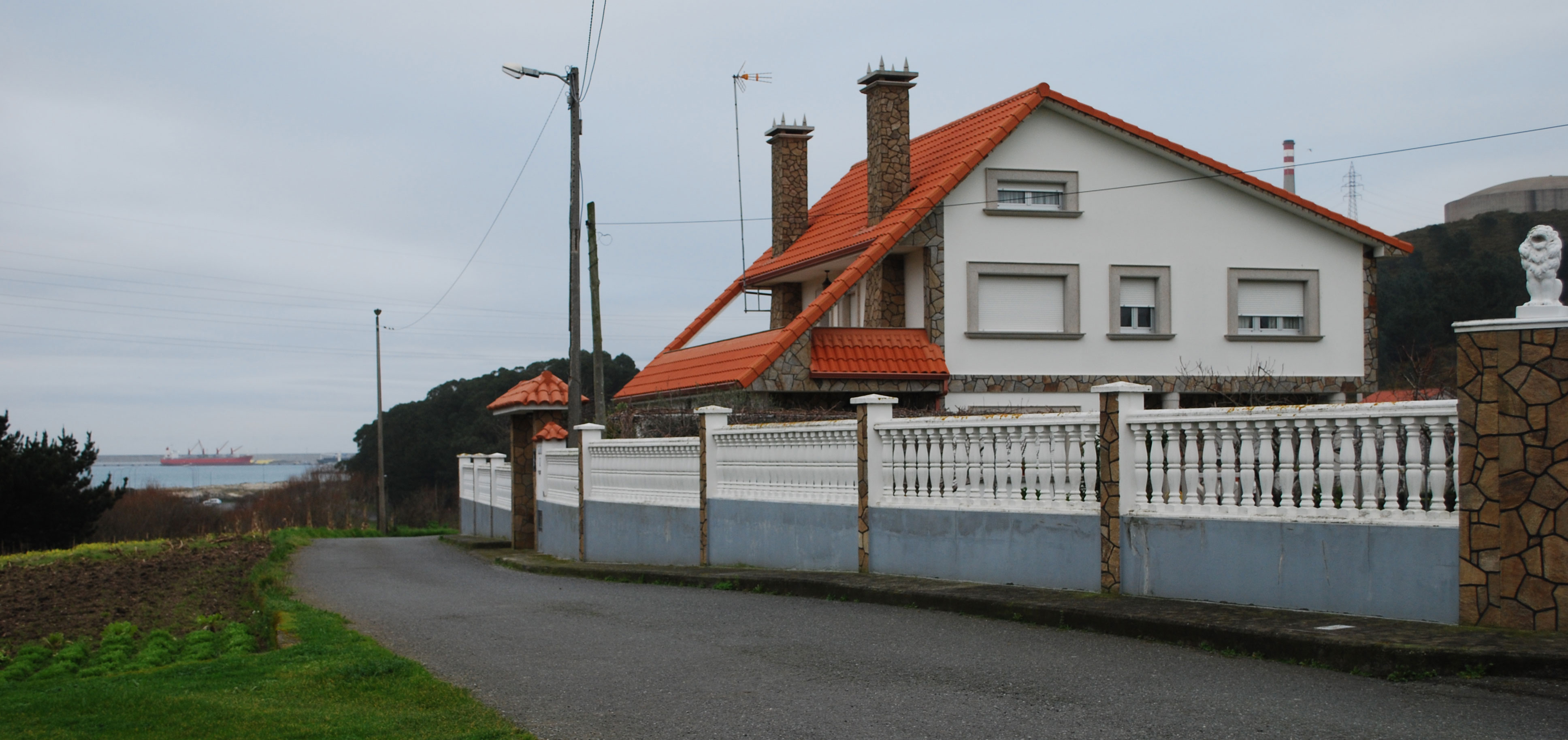 Vista de O Rañal Concello de Arteixo Polígono de Sabón A Coruña Galiza Spain